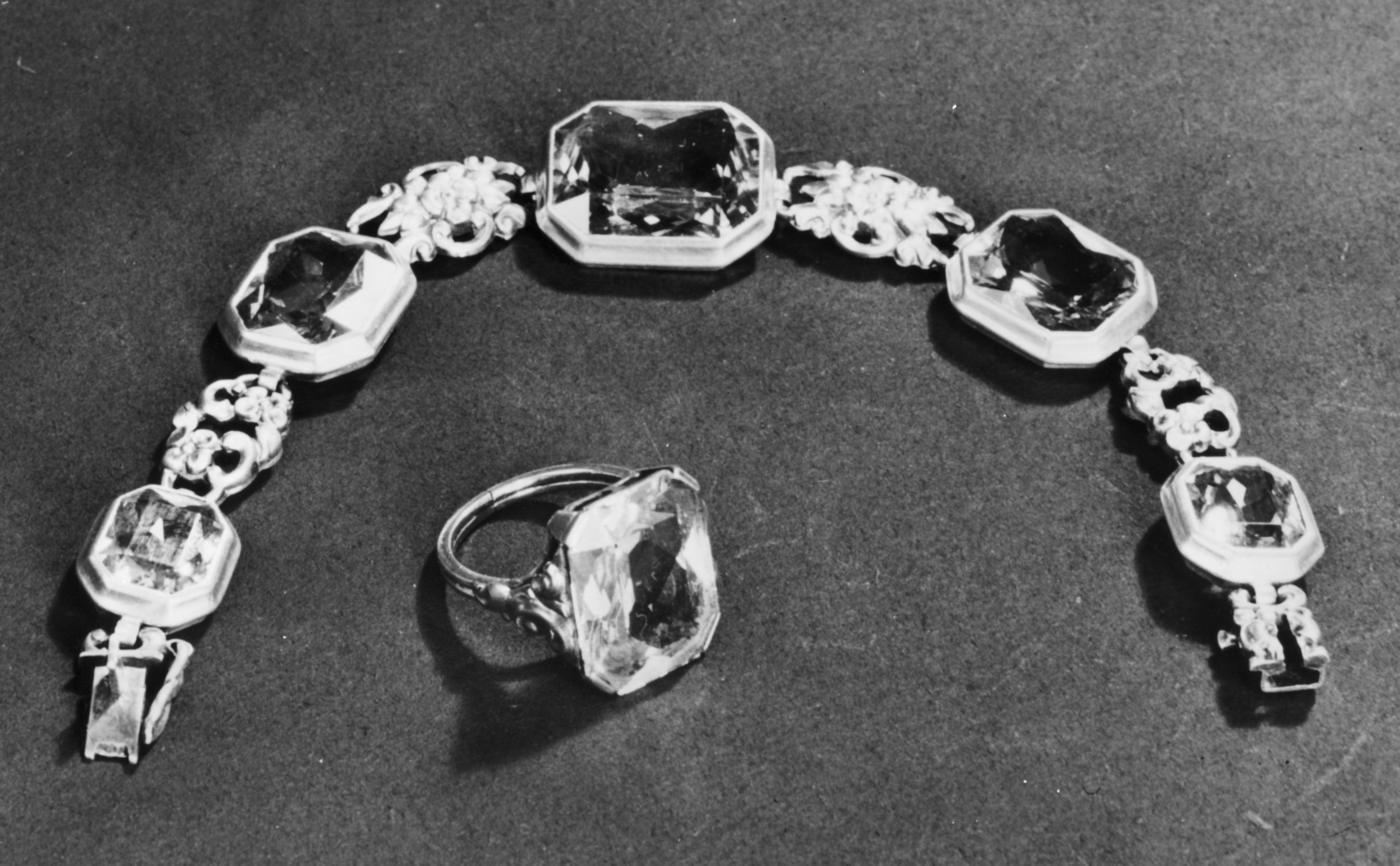 Im Elektrochemischen Kombinat Bitterfeld hergestellte künstliche Edelsteine.